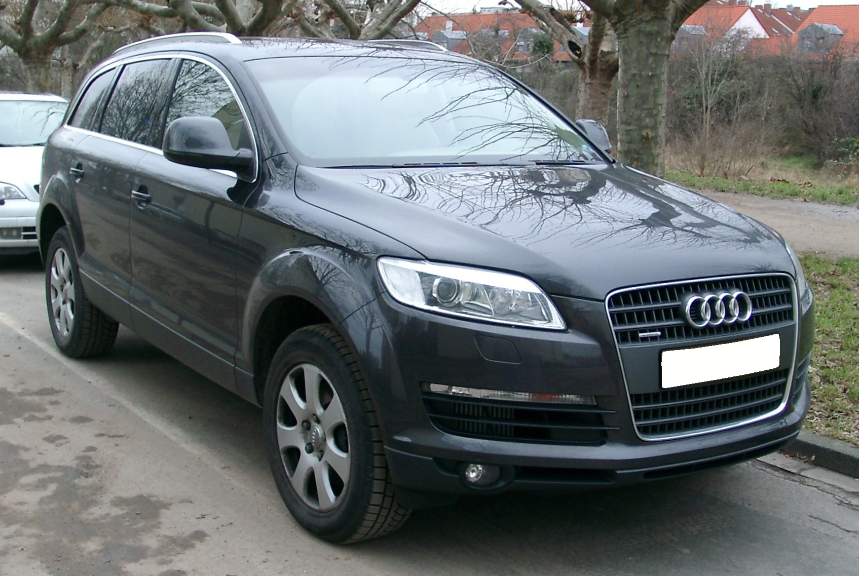 Audi Q7